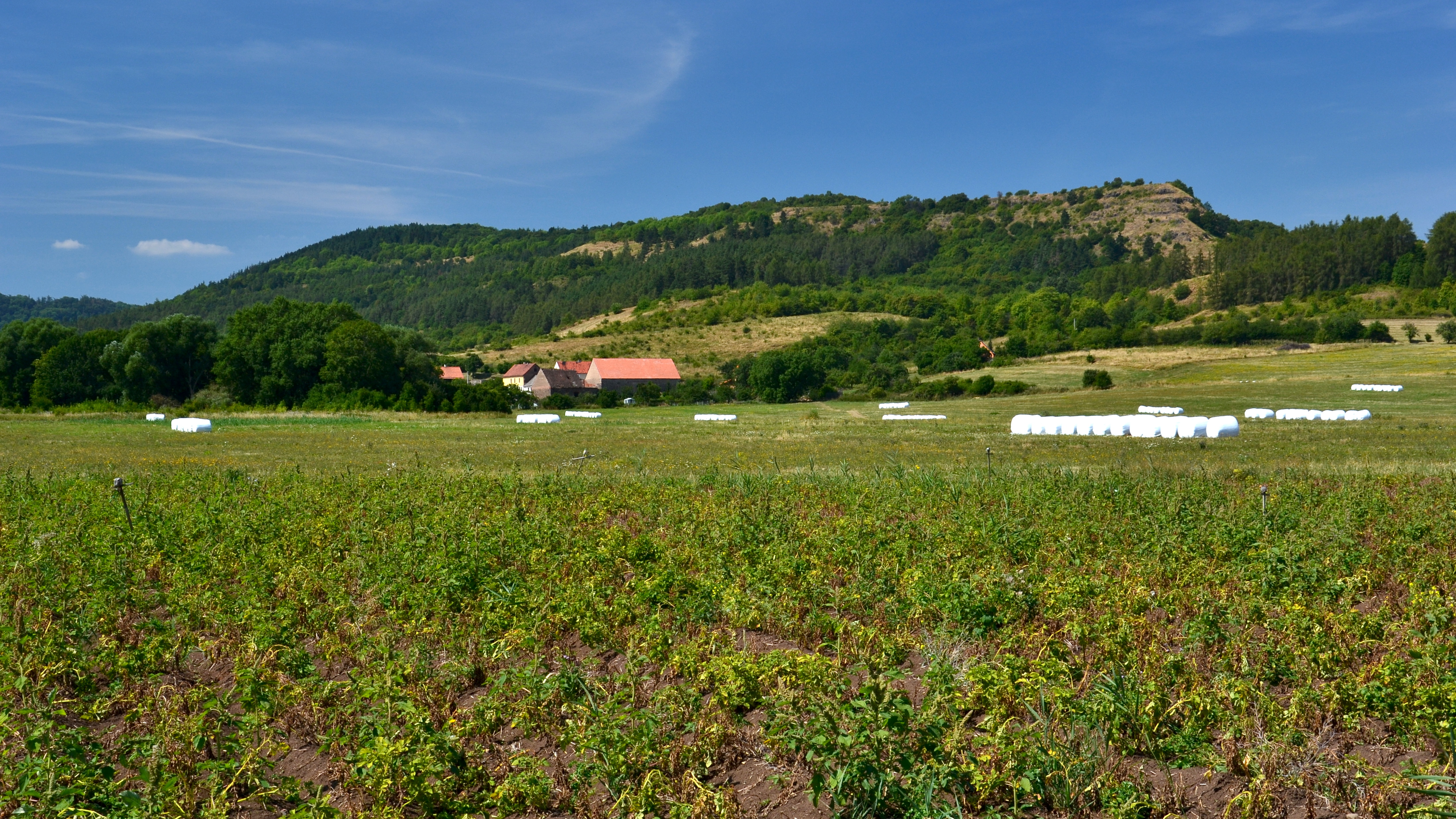 Výšinné opevněné sídliště - hradiště Úhošť, archeologické stopy (Úhošťany), Úhošťany